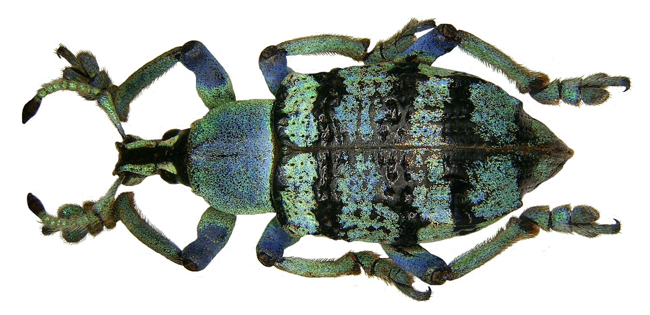 Familie: Curculionidae Größe: 22-30 mm Fundort: West-Papua, Ransiki leg: A.Weigel, 2007; det. U.Schmidt, 2008 Foto: U.Schmidt, 2008